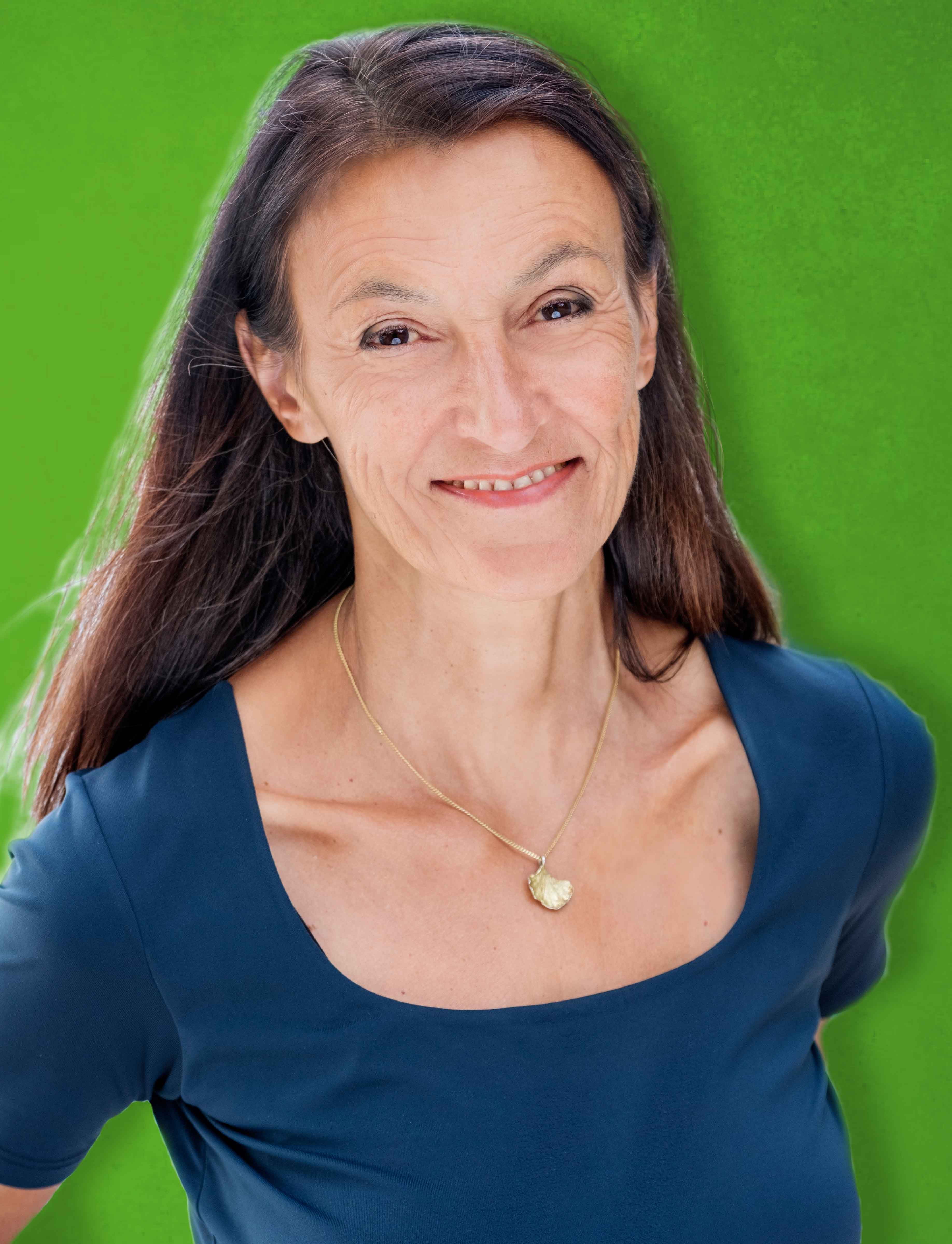 Porträt